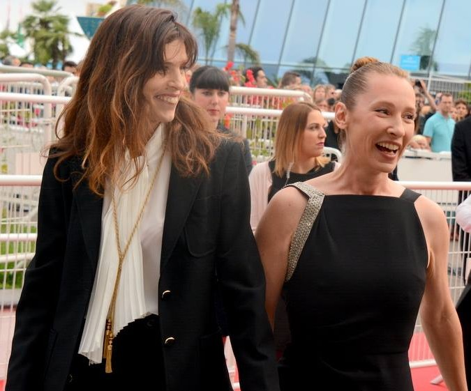 Maïwenn et Emmanuelle Bercot au festival de Cannes